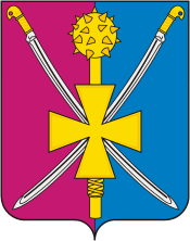 Герб Атаманского сельского поселения, Краснодарский край, Россия.